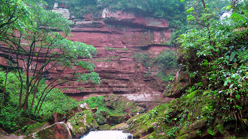 Muro de Piedra como de una pared grande.